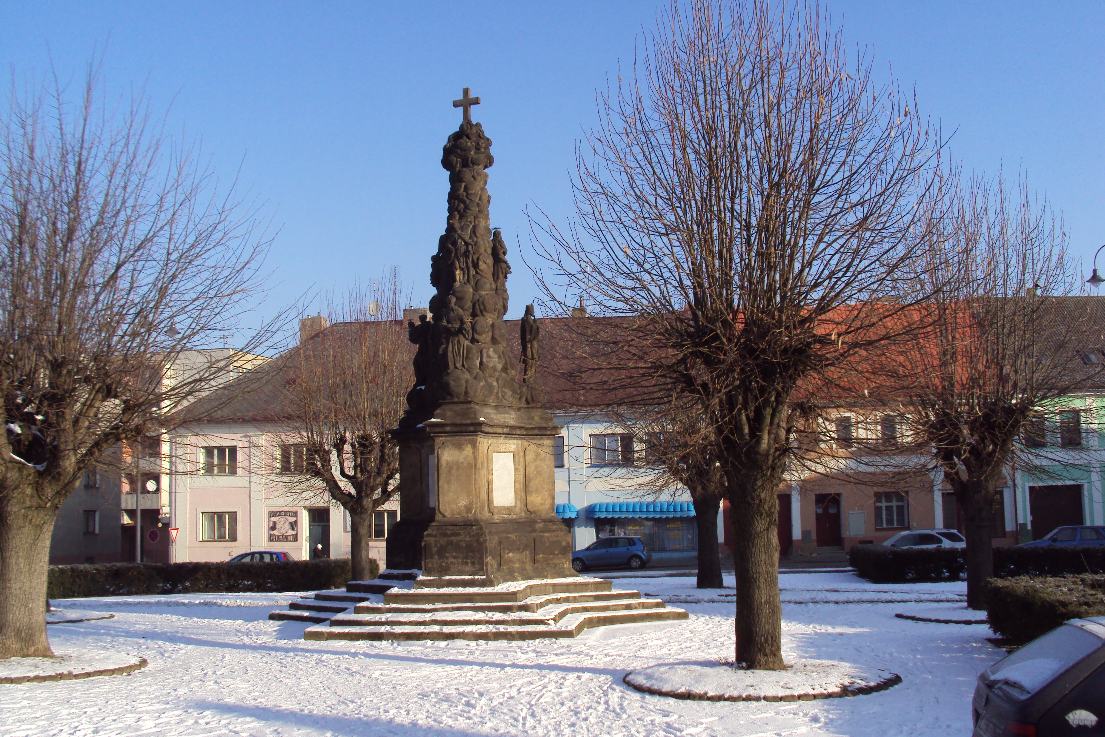 Morový sloup na Masarykově náměstí v Dubé